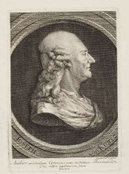 Kupferstichporträt des Komödianten Joseph von Kurz, Platte: 171 x 117; Blatt: 240 x 183, aus dem Herzog Anton Ulrich-Museum. Inschrift: „IOSEPH von KURTZ; Author und Berühmter Comicus [...] gewidmet von seinen Gönnern.“